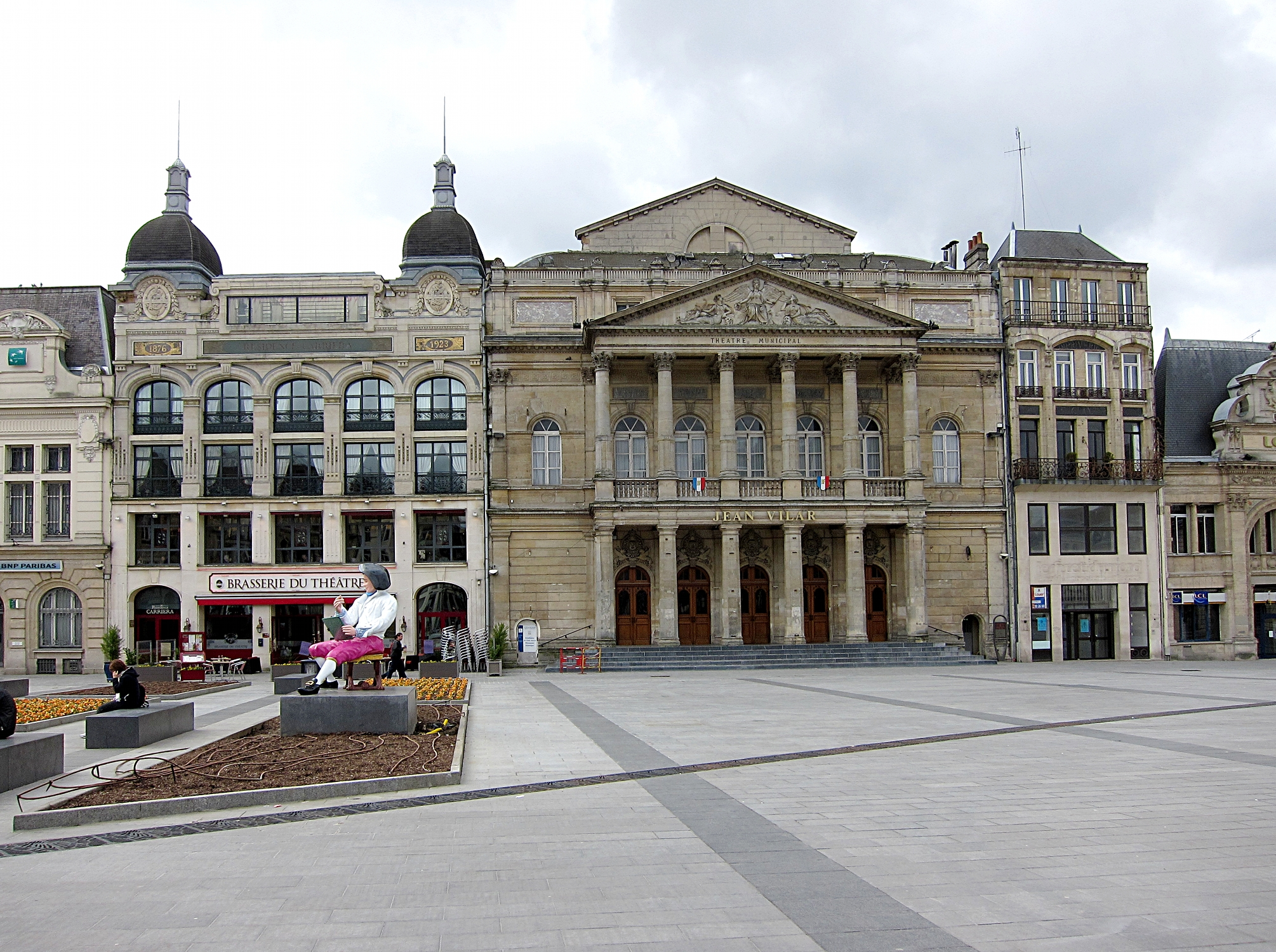 Le théâtre municipal Jean Vilar de Saint-Quentin (Aisne).